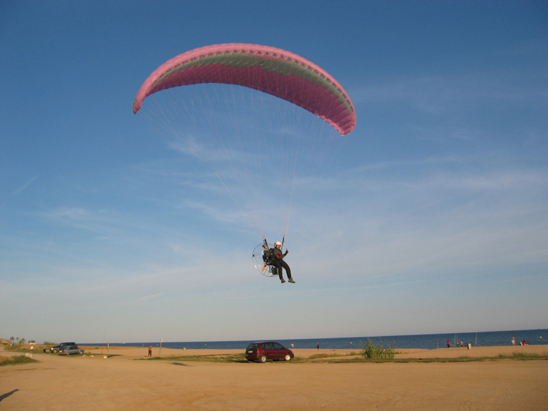 Paramotor a punt d'aterrar a la platja d'Arenys de Mar.